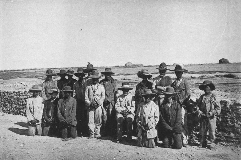 Deutsch-Südwest-Afrika 53. Hoachanas. Manasse Noresib, Oberhäuptling der "Roten Nation" mit seinen Grossleuten.